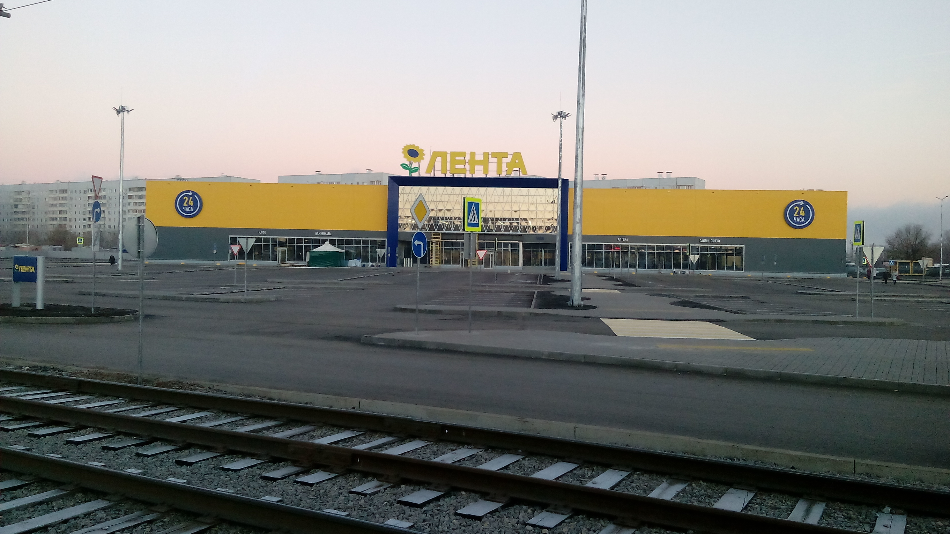 открытие второго гипермаркета Лента в городе Набережные Челны